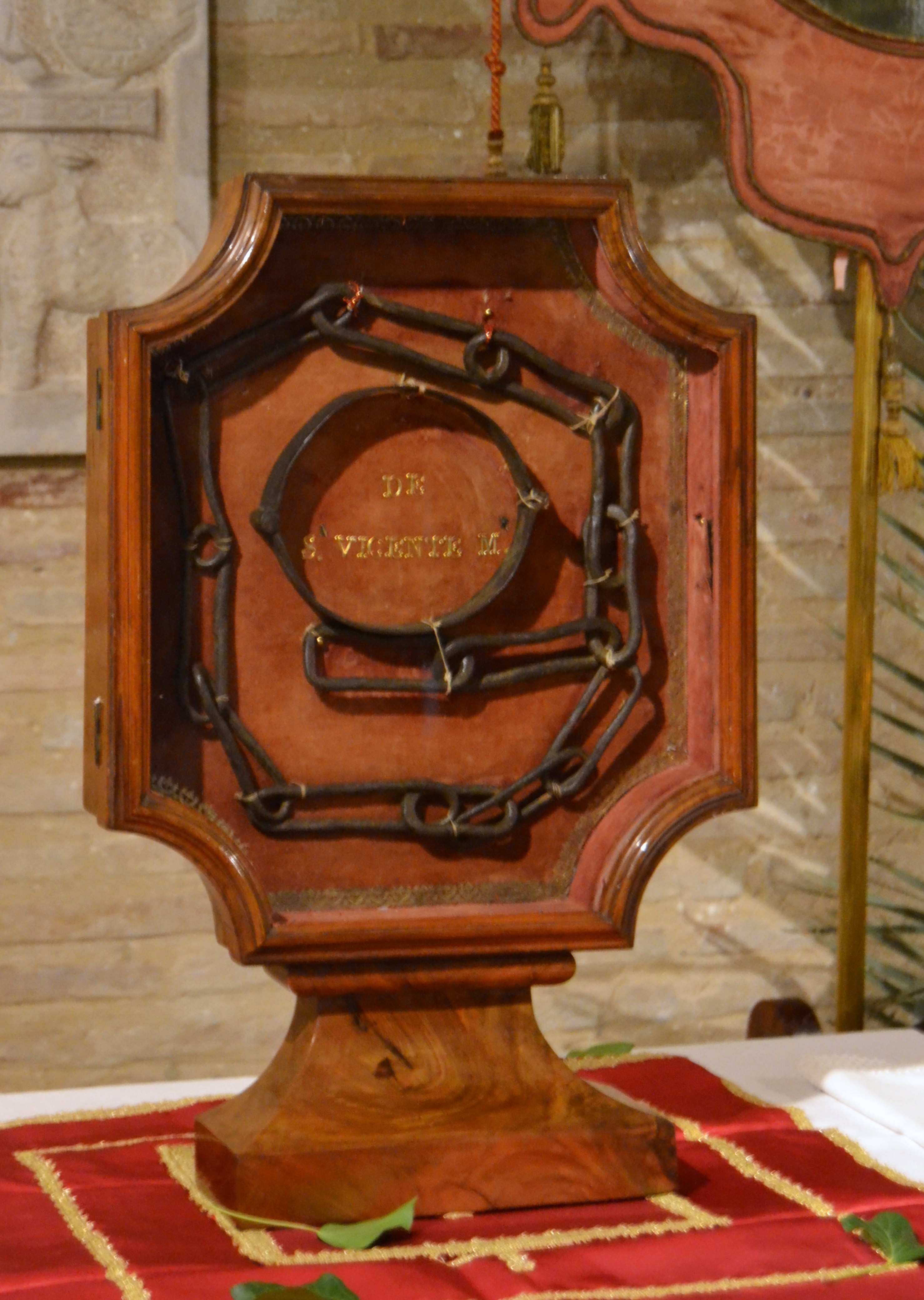 Capella-presó de Sant Vicent Màrtir, cadena on se suposa que va estar lligat sant Vicent Màrtir.